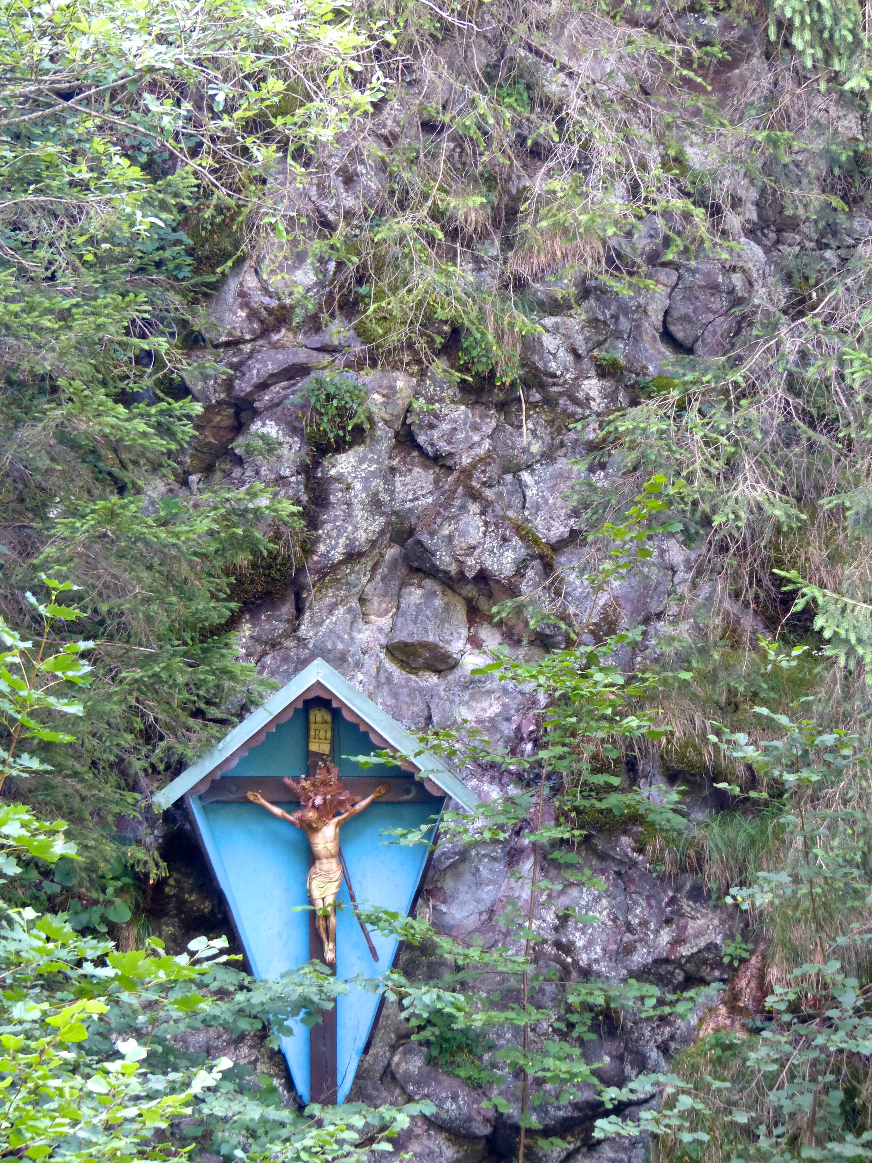 WikiProjekt Landstreicher Hindelang - Diabasaufschluss